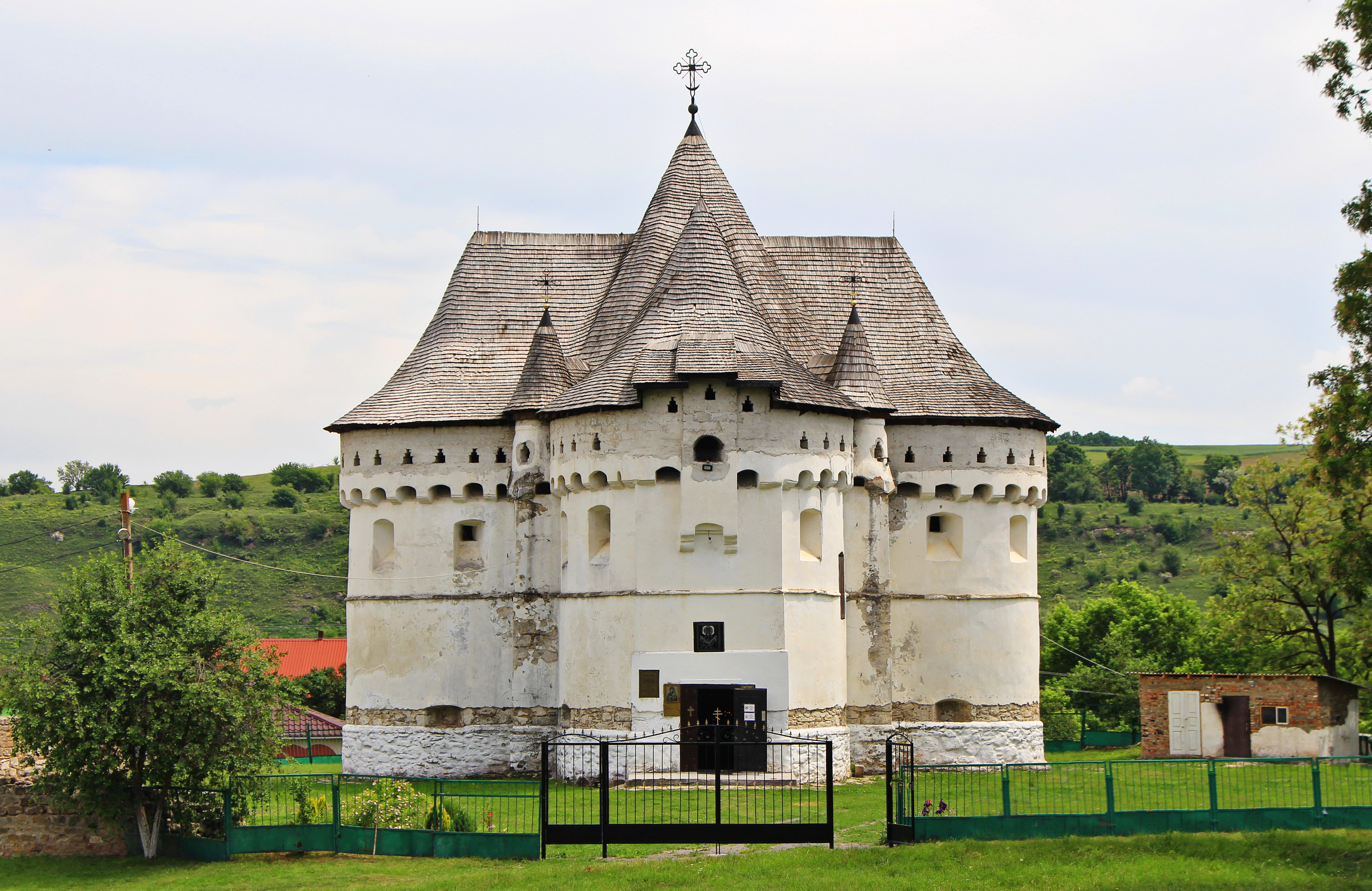 Покровська церква-фортеця (мур.), Сутківці